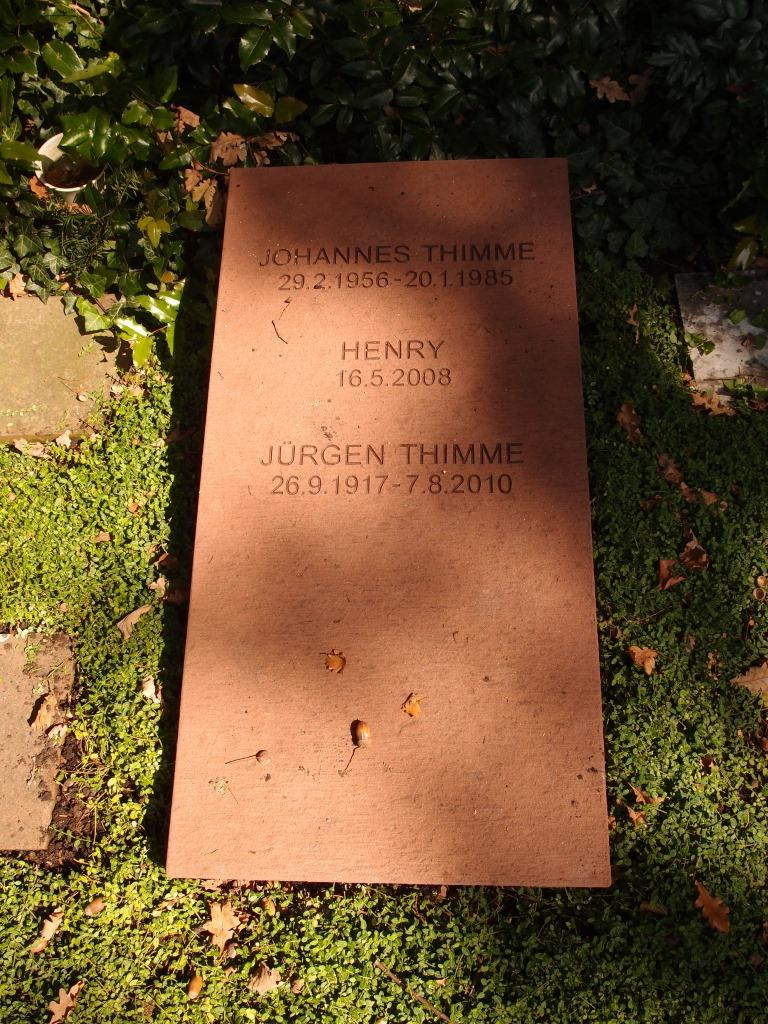 Prof. Dr. phil. Jürgen Thimme (* 26. September 1917 in Berlin; † 7. August 2010) war ein deutscher Marineoffizier, Kunsthistoriker und Archäologe. Er war in Karlsruhe am Badischen Landesmuseum tätig.